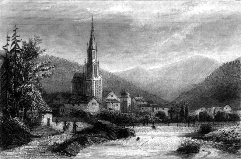 Image en provenance du livre : Eusèbe Girault de Saint-Fargeau, Guide pittoresque du voyageur en France, contenant la statistique et la description complète des quatre-vingt-six départements, orné de 740 vignettes et portraits gravés sur acier, de quatre-vingt-six cartes de départements et d'une grande carte routière de la France, par une Société de gens de lettres, de géographes et d'artistes, Paris, F. Didot frères, 1838, 6 volumes in-8° (BNF : 8-L25- 46). Volume III Didot frères, 1838. Route de Paris à Nice traversant les départements de l'Isère, des Hautes-Alpes, des Basses-Alpes et du Var. auteurs dessins : Rauch (ou autre) auteurs gravures : Skelton fils, Schroeder, Bishop (ou autre)